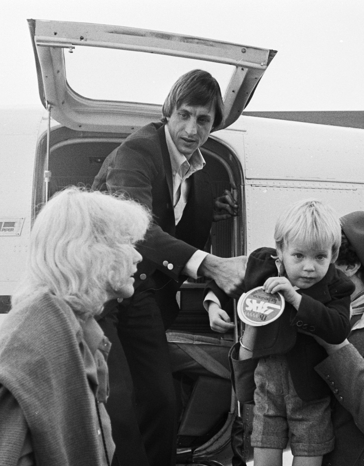 Vertrek Nederlands elftal van Schiphol naar Noord Ierland Cruyff met zoontje Jordi, links Danny Cruyff